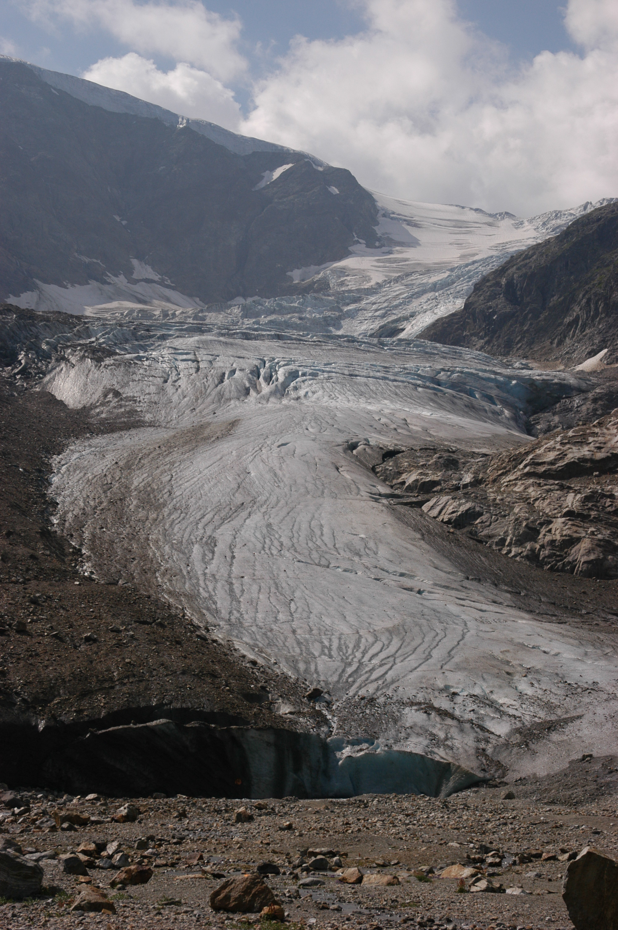 (en) Steingletscher in Summer (de) Steingletscher im Sommer Place/Ort: Berner Oberland, CH. Sustenpass, Steingletscher.